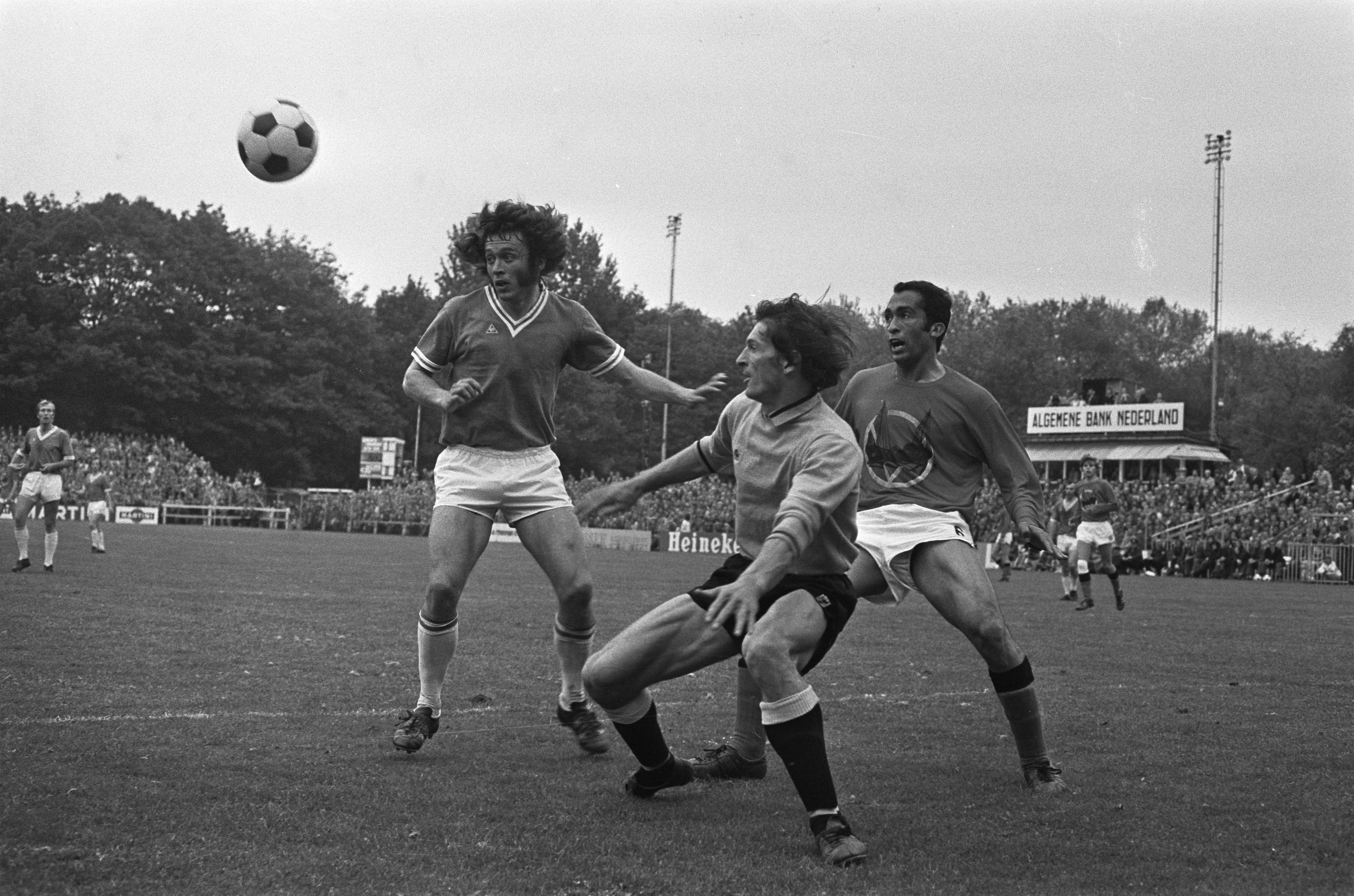 De Graafschap tegen Volendam 1-0, spelmoment midden keeper Oosterhout ( De Graafschap ), rechts Ferreira